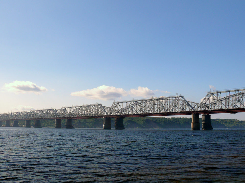 Свияжский железнодорожный мост